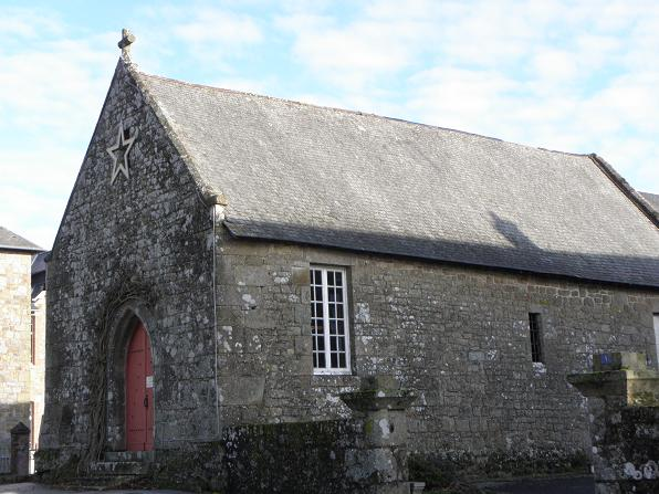 Chapelle Saint-Jean. Louvigné-du-Désert (35).